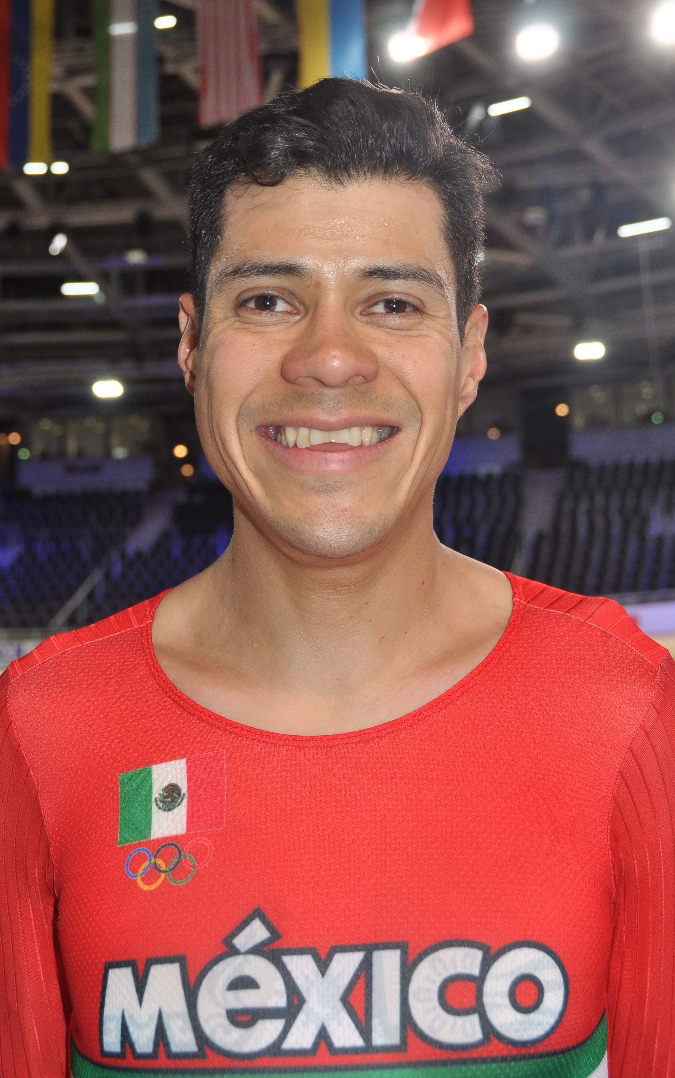 Ignacio Sarabia Díaz, Radsportler aus Mexiko